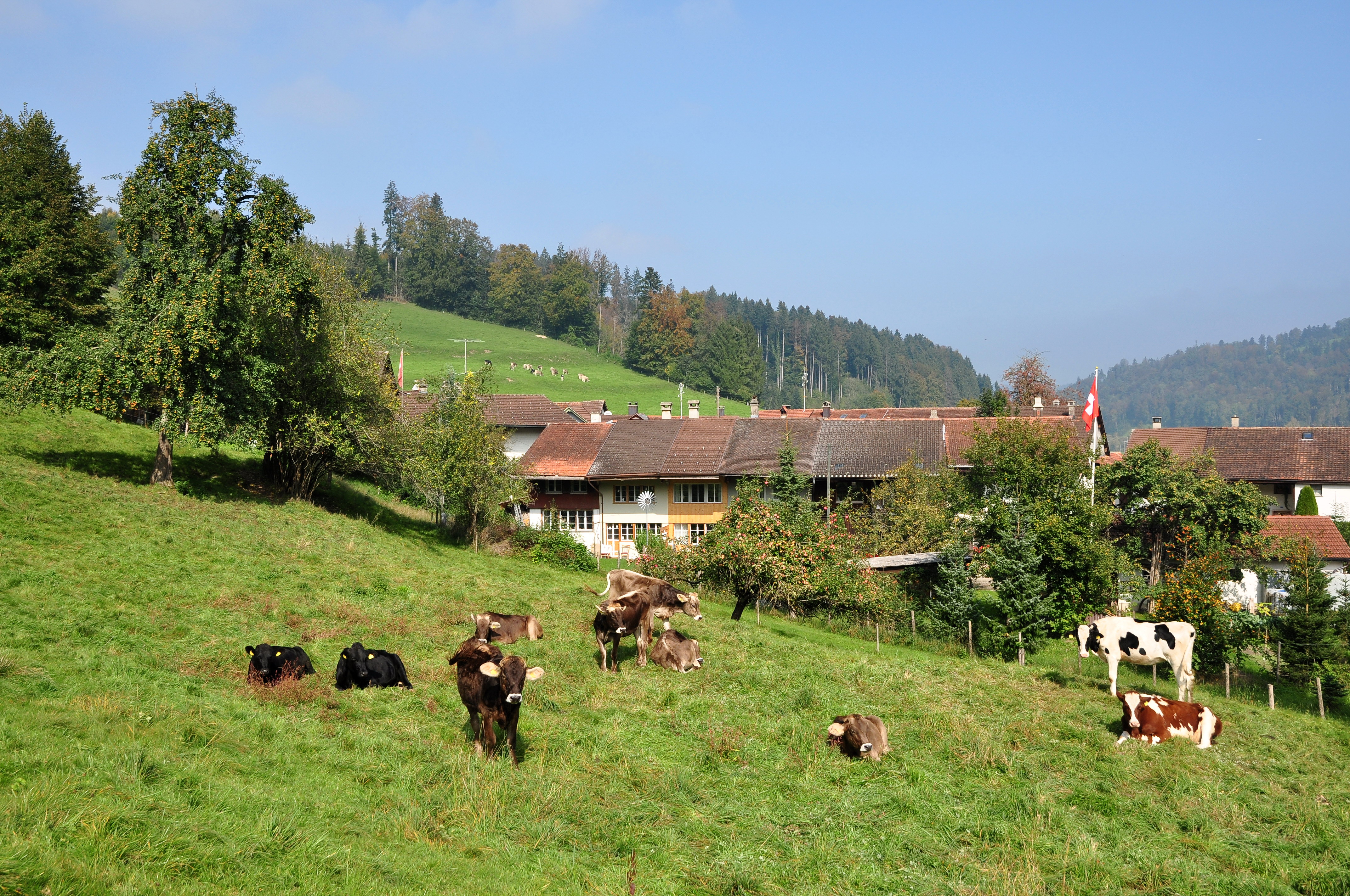 Flarz mit Haus Freddi, Undelstrasse 29–37 in Bauma (Switzerland)